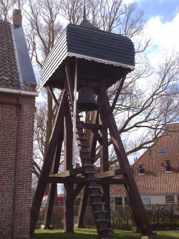 Klokkenstoel in Goingarijp